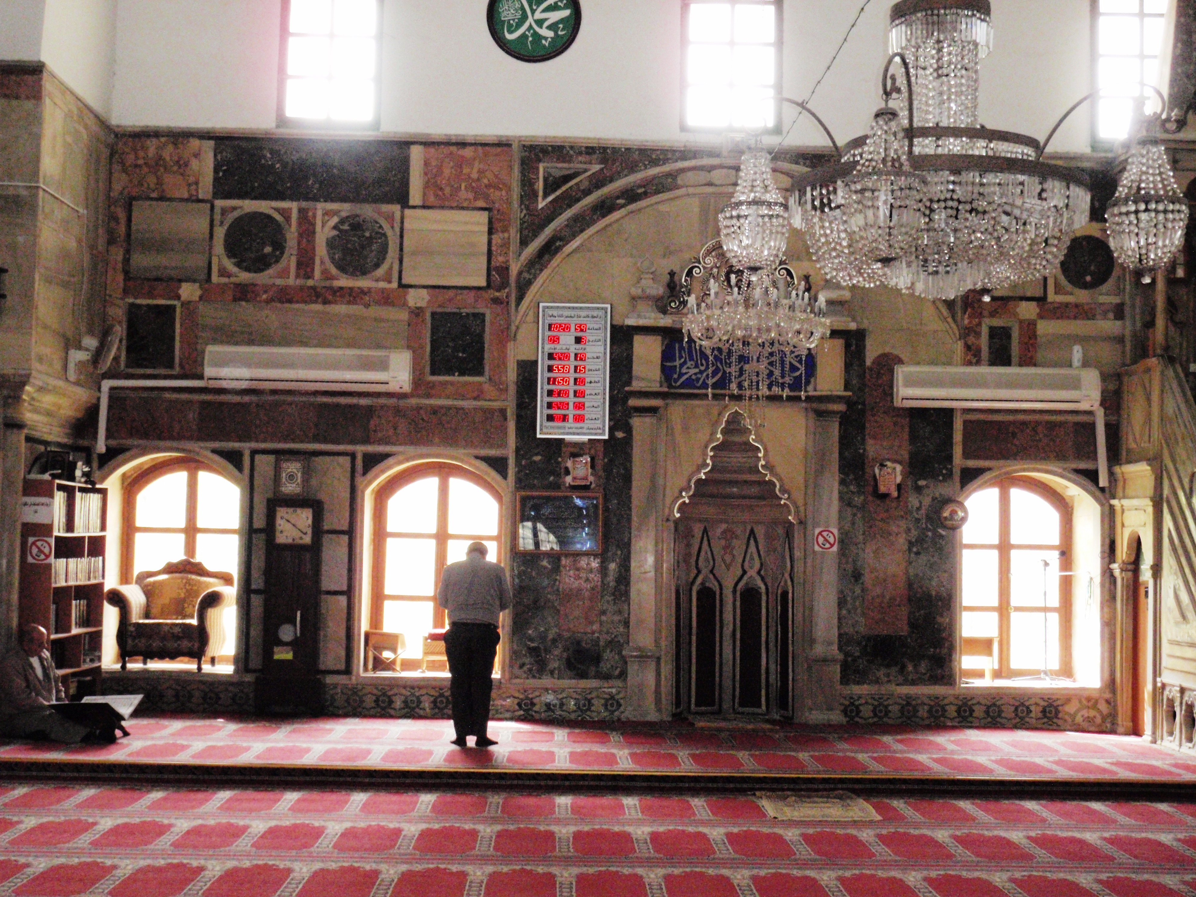 סיור בעכו Mosque of Al-Gazar